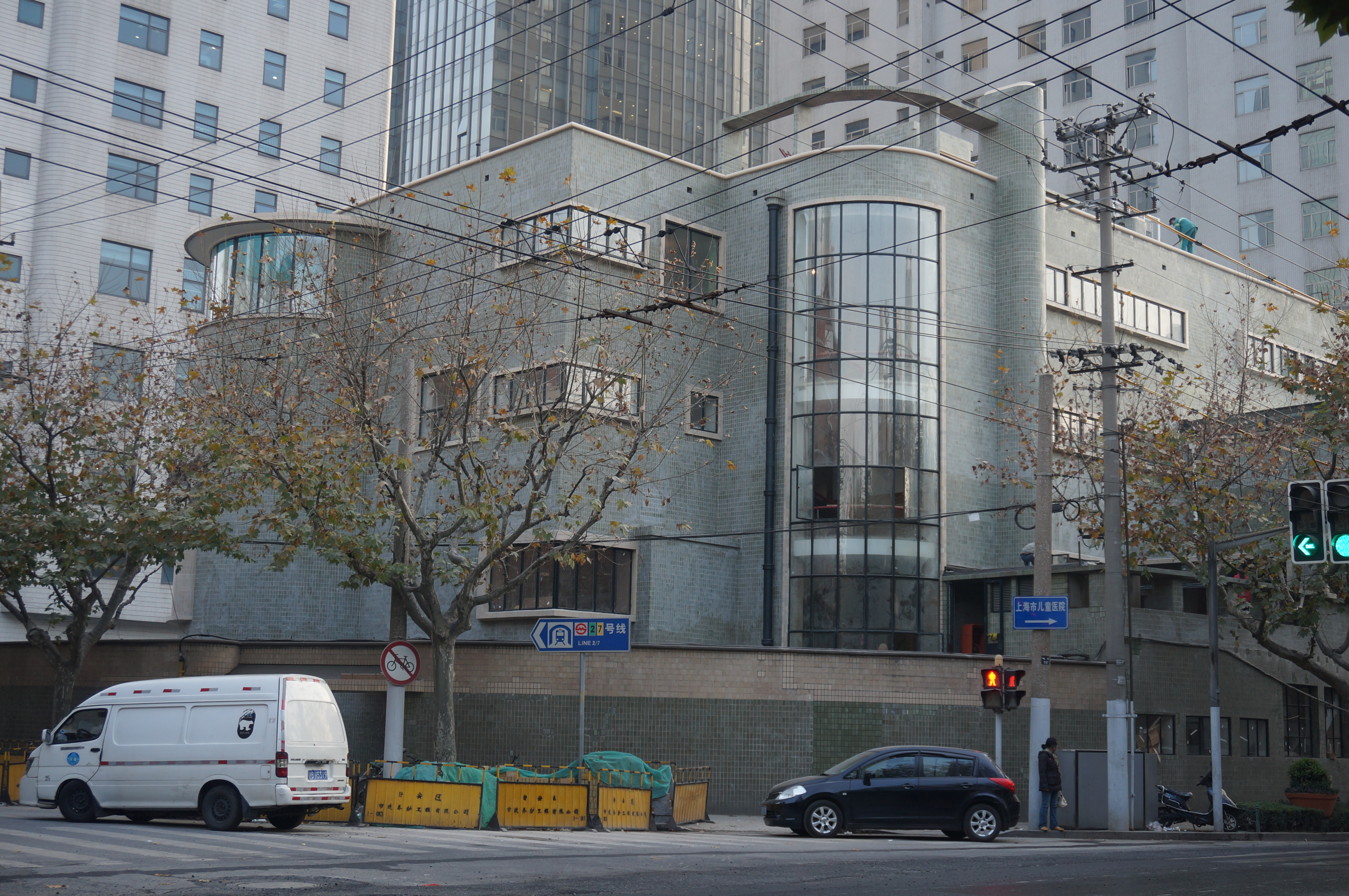 中文（中国大陆）: 上海市第二批优秀历史建筑——吴同文住宅